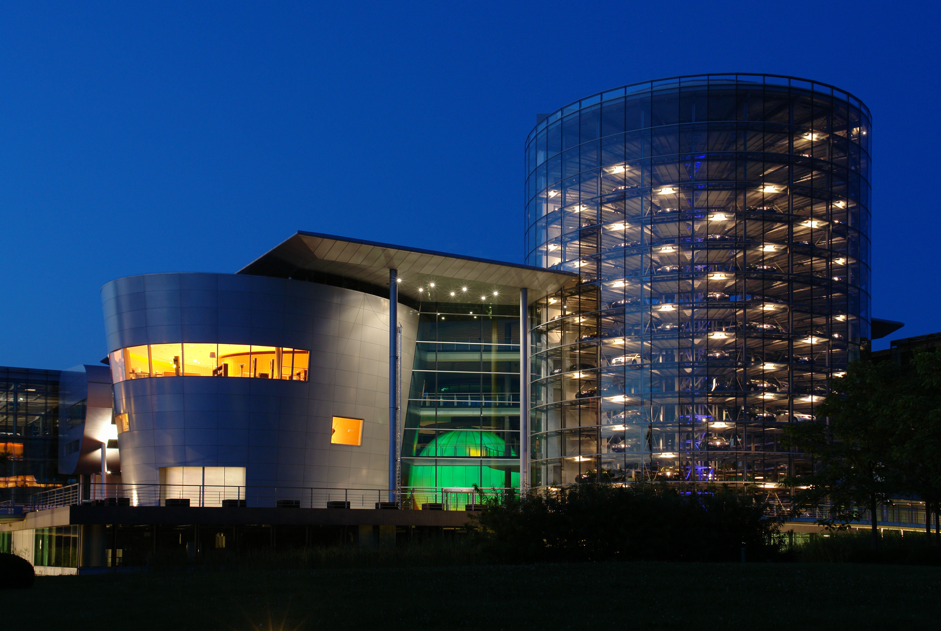 Gläserner-Manufaktur Dresden bei Nacht